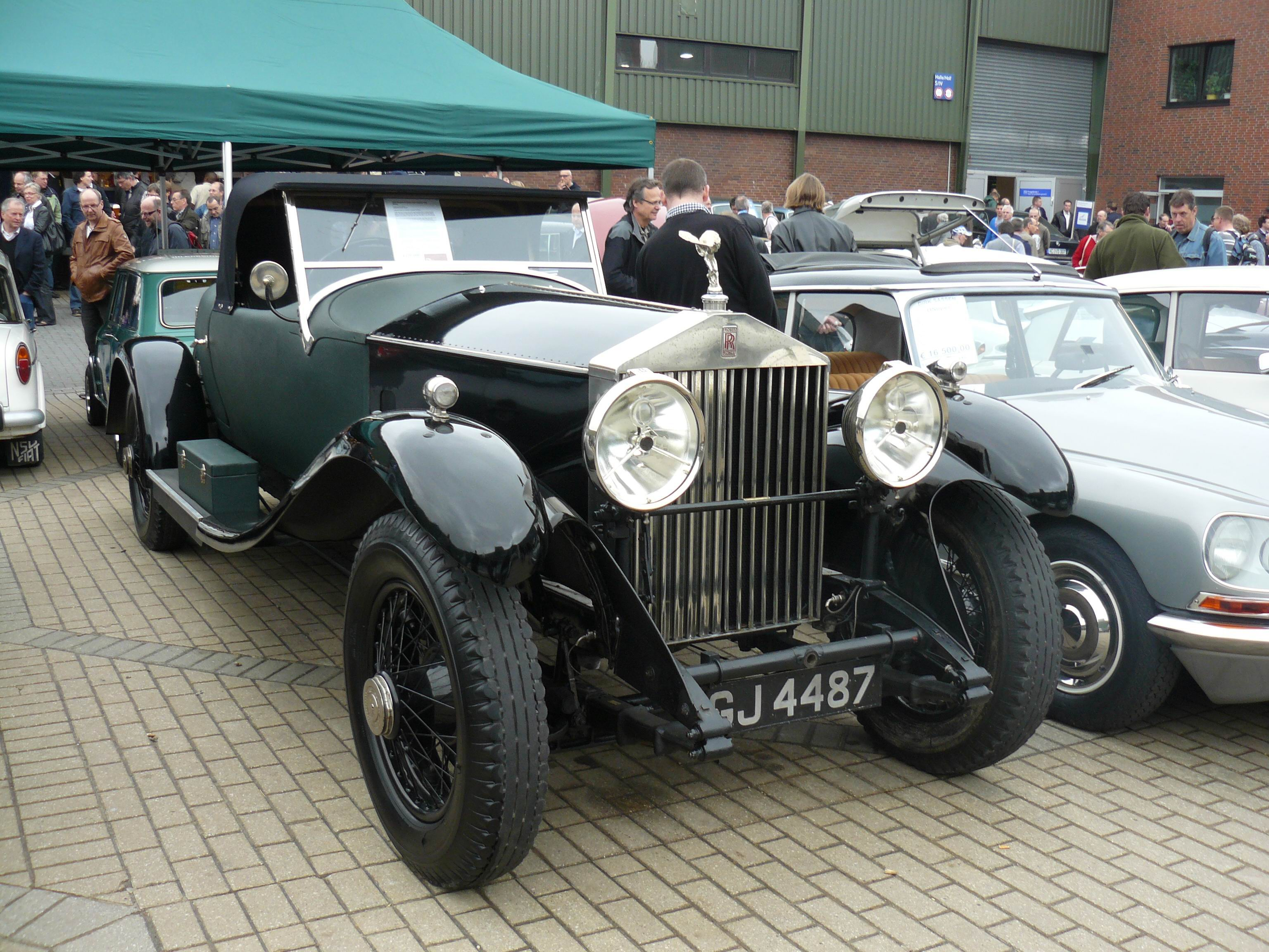 1930 Rolls-Royce Phantom II short chassis, fabric open 2-seater with dickey "body by Kellner"Essen 2011Until recently a hearse